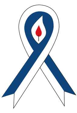 Logo Spolku pro zachování odkazu českého odboje